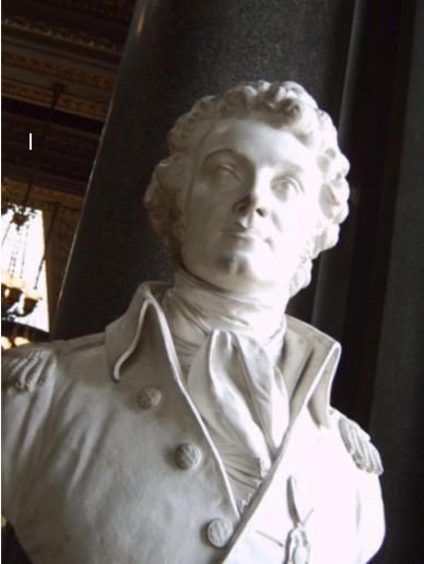 buste de la galerie des batailles du château de Versailles